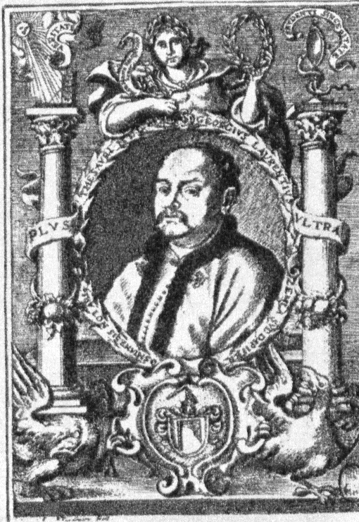 Белорусская гравюра XV века на меди (медерит), изображающая ошмянского пристольника Г. Землю.